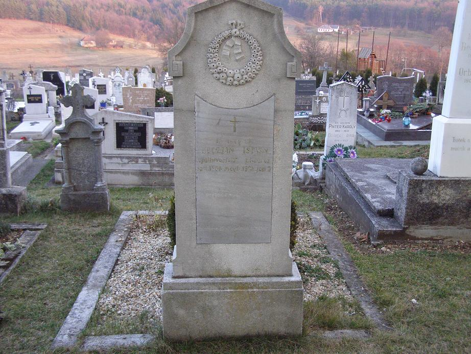 The tomb of Priest Kóczján István in Apátistvánfalva